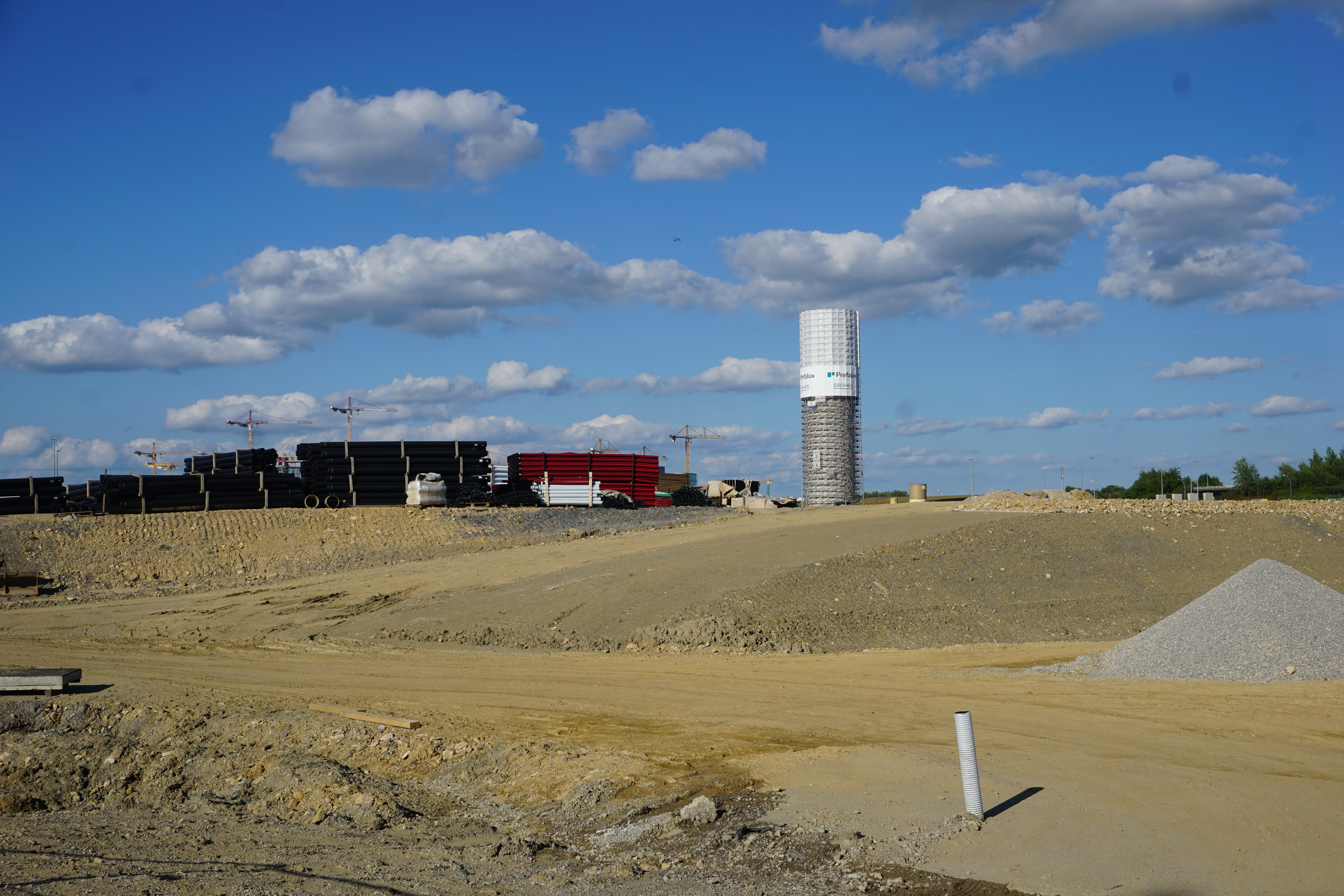 Luxembourg: travaux de terrassement pour le nouveau stade national de football